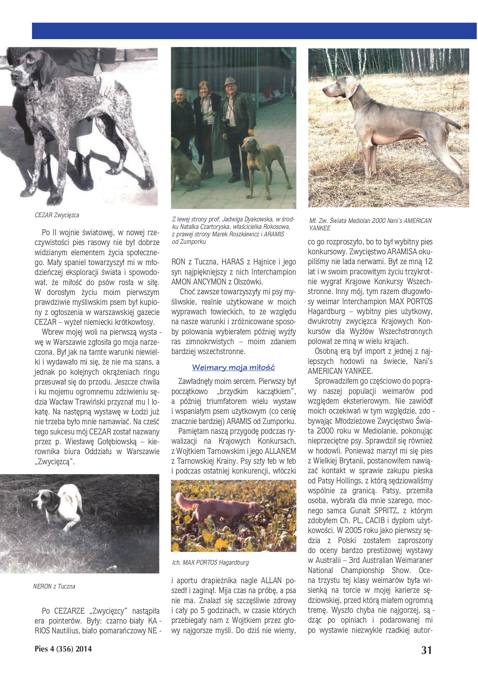 "Tradycja i zamiłowanie", PIES, 4 (356) 2014, strona 2/4.